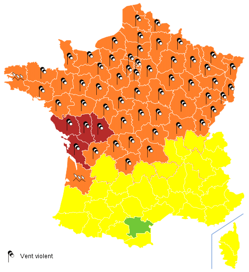 Carte vigilance meteo france 28 février 2010 6h00